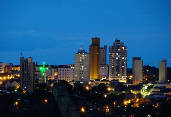 Vista Noturna